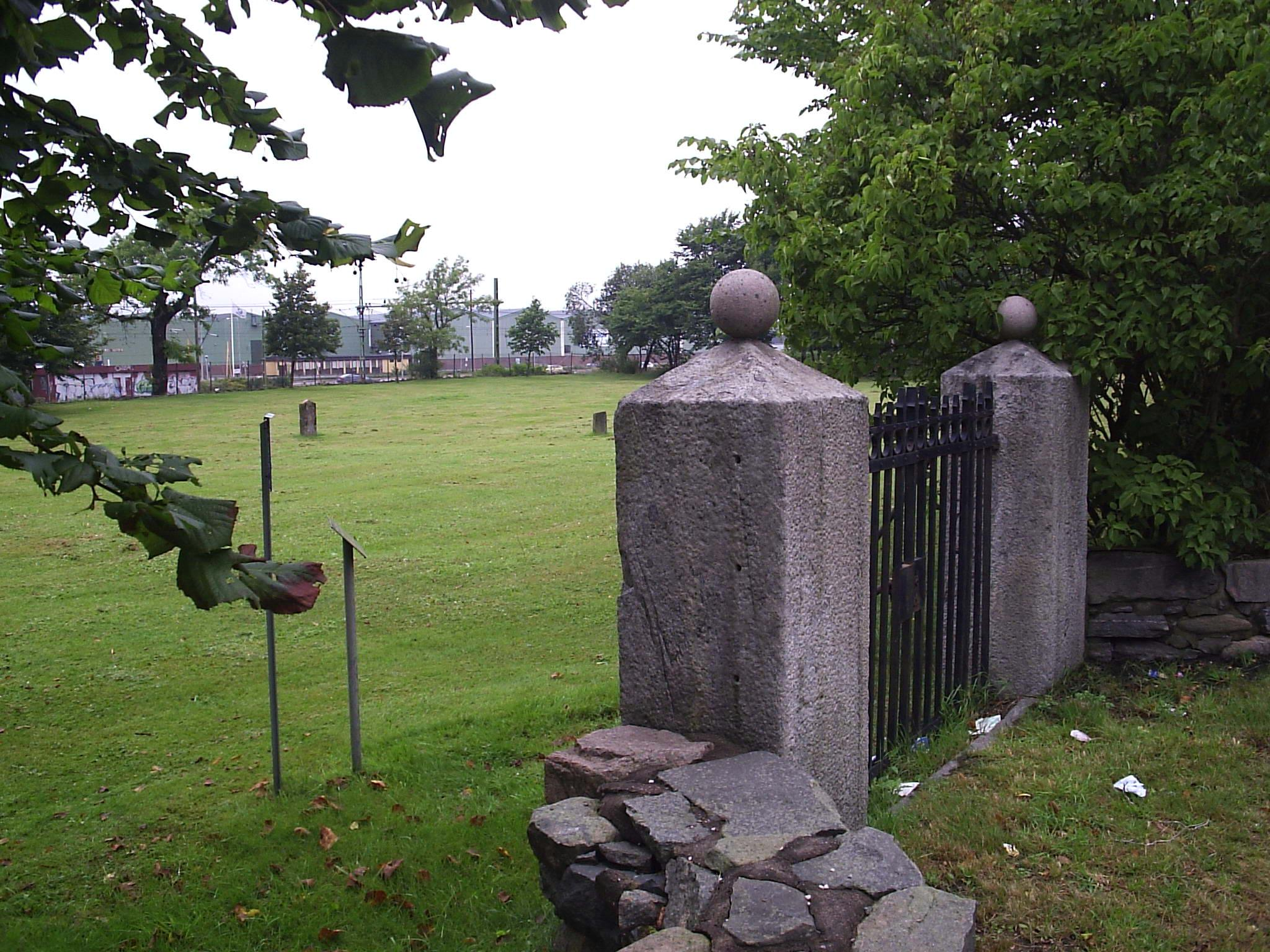 Hospitalsruinen vid Gamlestaden i Göteborg, den 7 september 2005. Fotografi taget av Harri Blomberg.